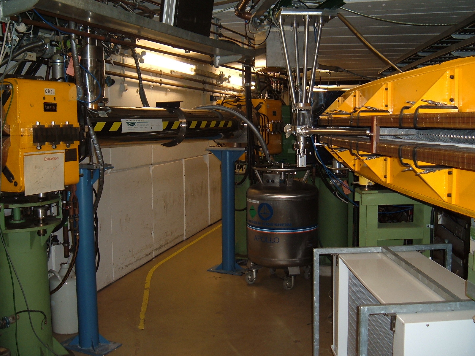 Ausschnitt des Teilchenbeschleunigers ELSA, Stelle an der Elektronen extrahiert werden